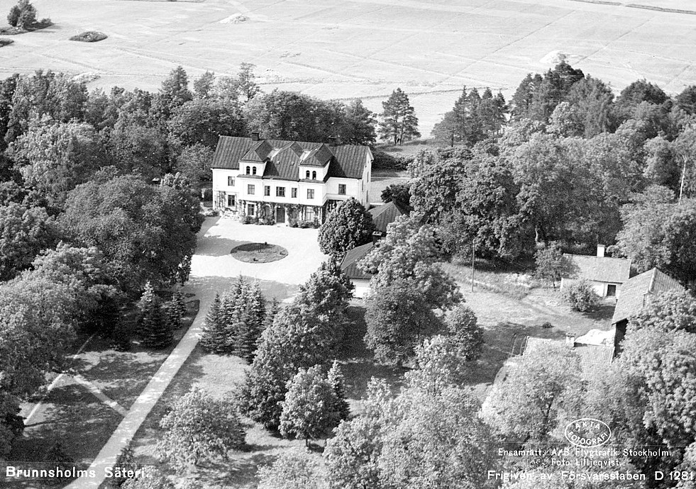 Flygfoto över huvudbyggnaden på Brunnsholms herrgård, Enköpings-Näs socken, Uppland 1936